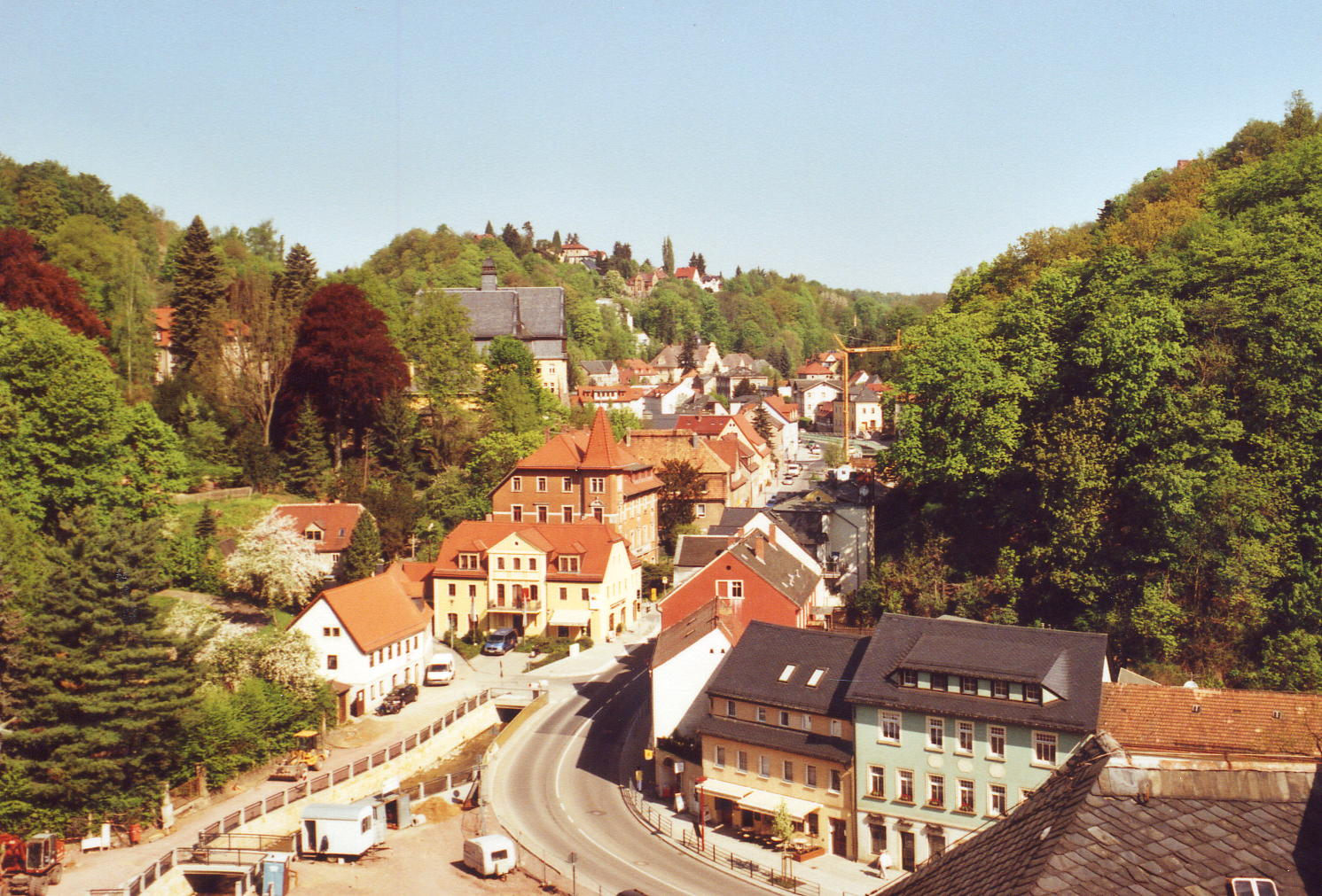 Tharandt: Blick vom Burgberg ins Schloitzbachtal.